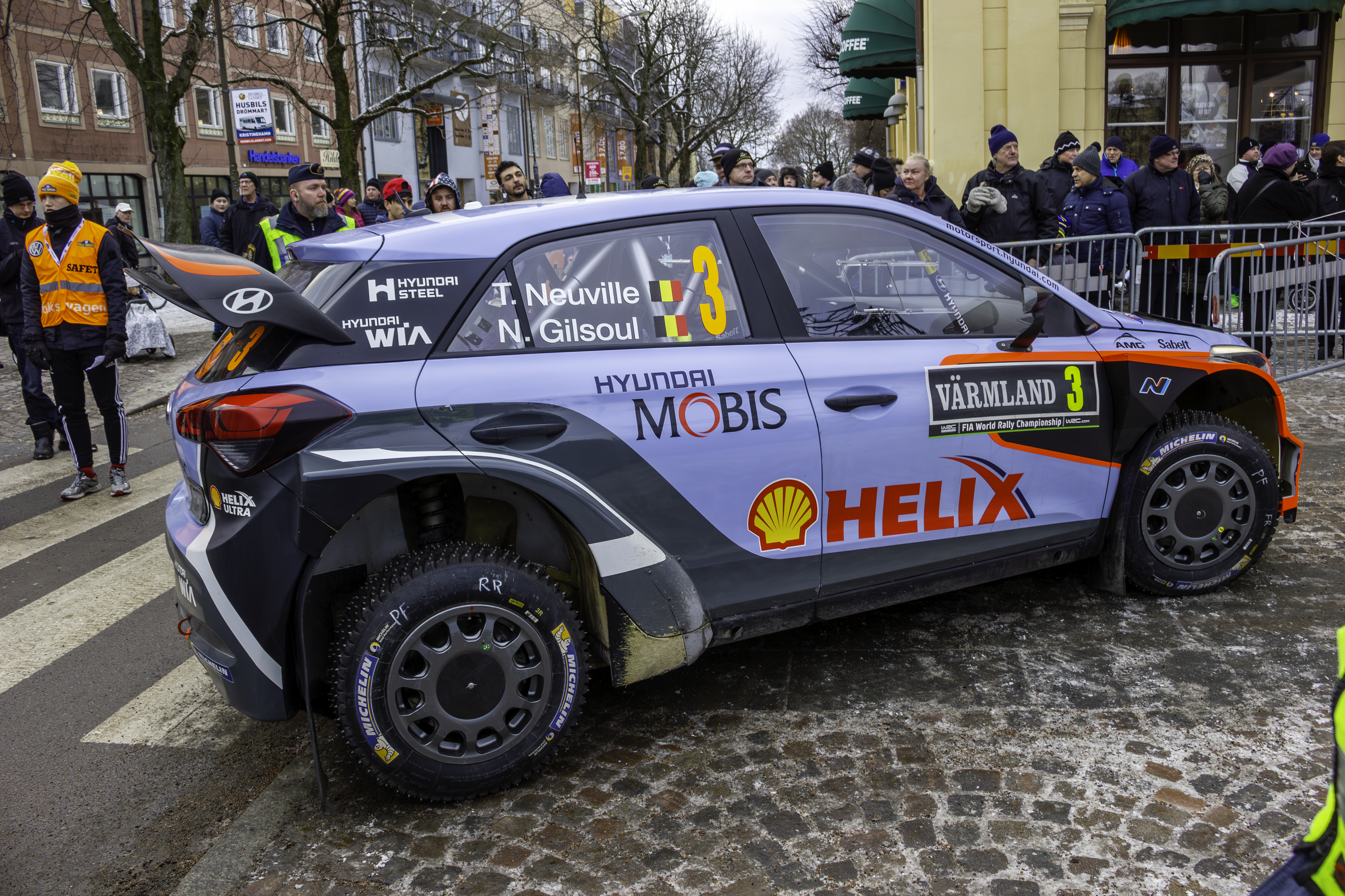 Hyundai i20 WRC de Thierry Neuville en Karlstad durante o Ralli de Suecia 2016.